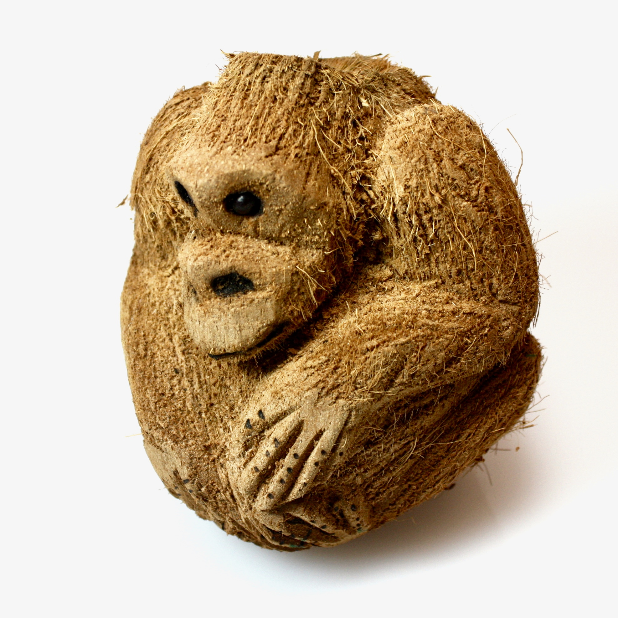 Muñeco de coco